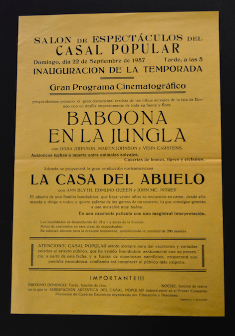 Imatge d'un cartell del Casal Popular (Palafrugell) (fons Círculo Mercantil - Arxiu Municipal de Palafrugell)